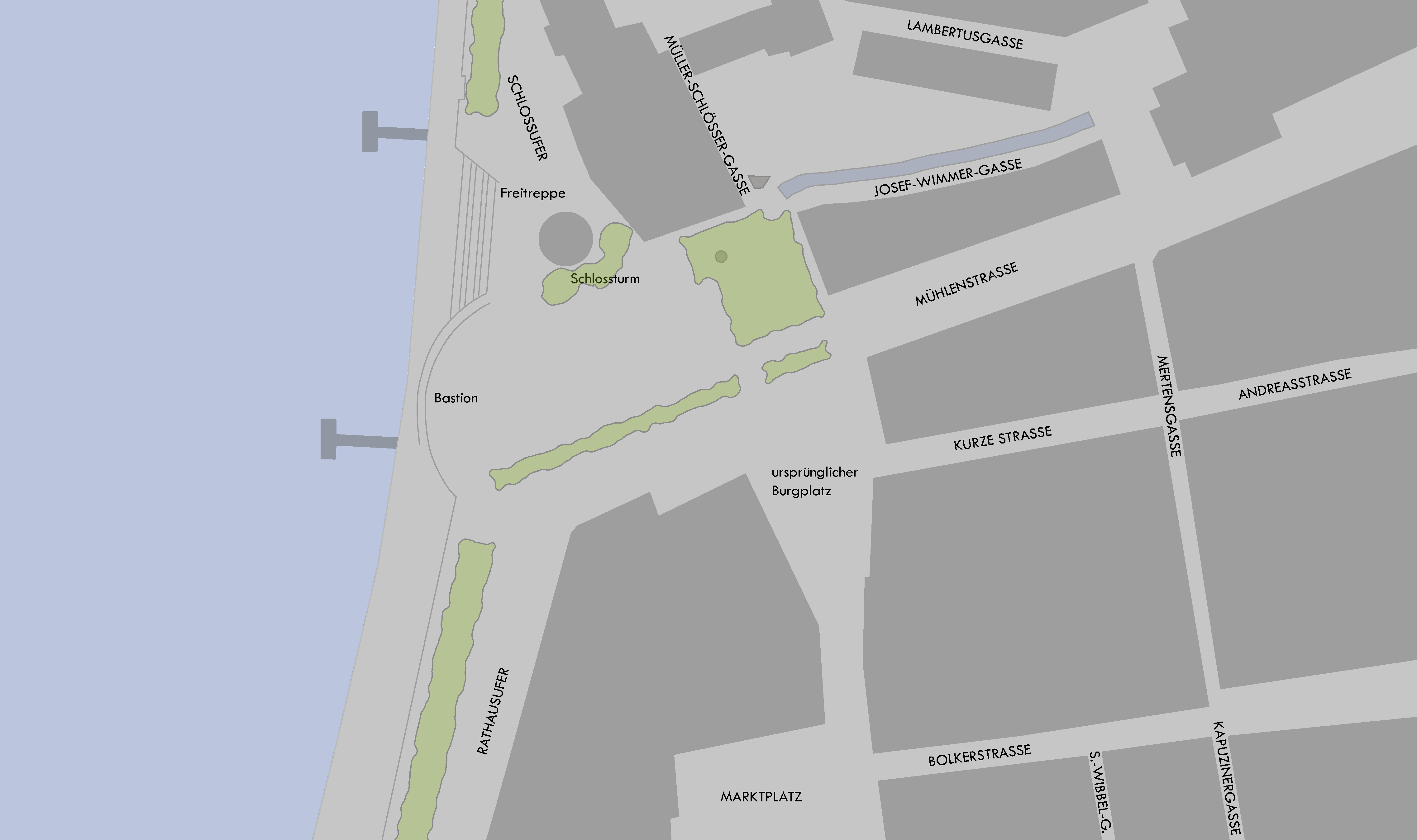 Map of Burgplatz, Duesseldorf / Lageplan Burgplatz, Düsseldorf